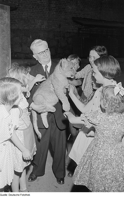 Original image description from the Deutsche Fotothek Prof. Schneider mit einem Löwen im Arm